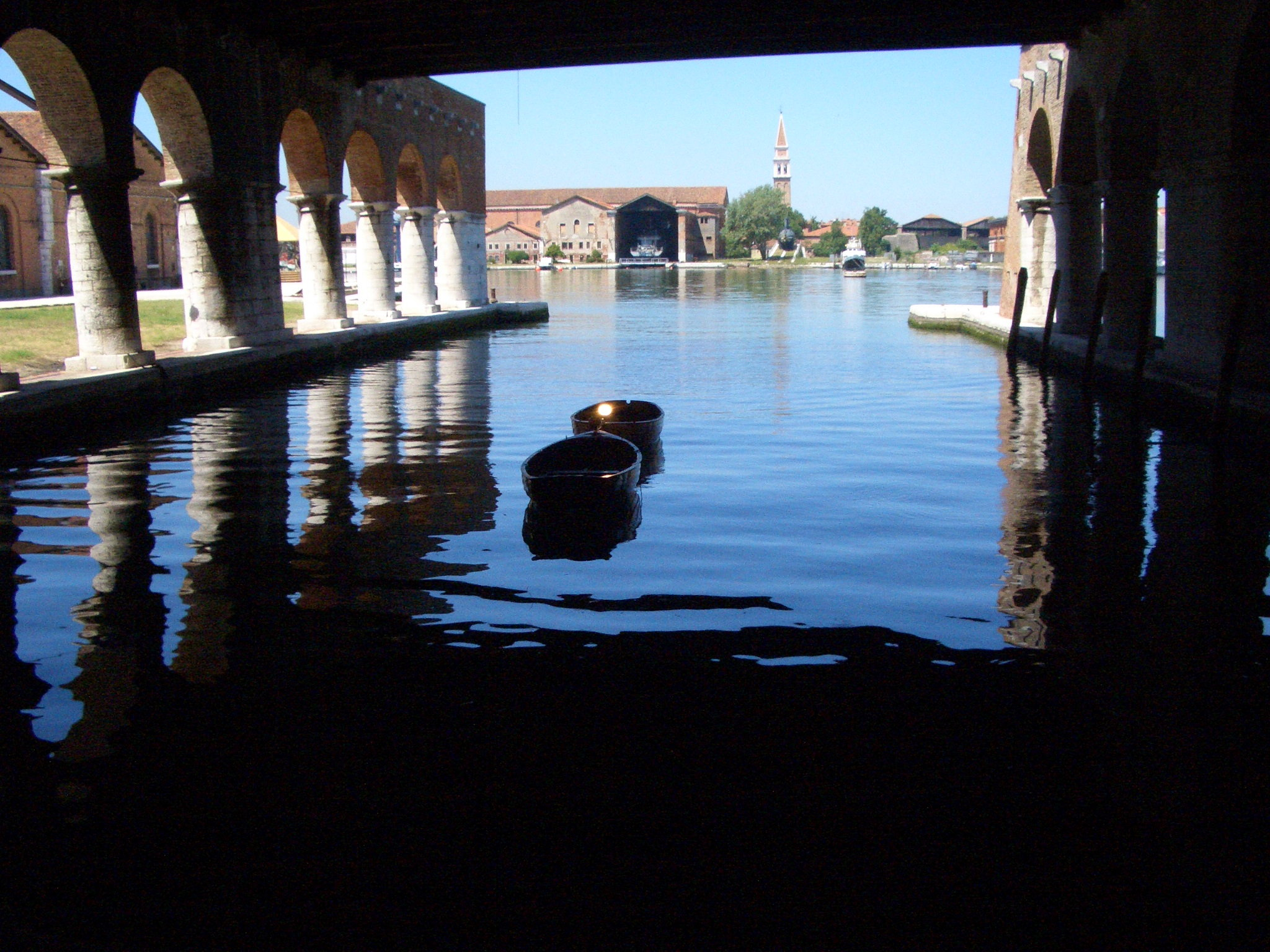 Arsenale di Venezia - Bacino di carenaggio. Foto scattata il 2.7.05 fotocamera Casio Exilim 5.0 mp.